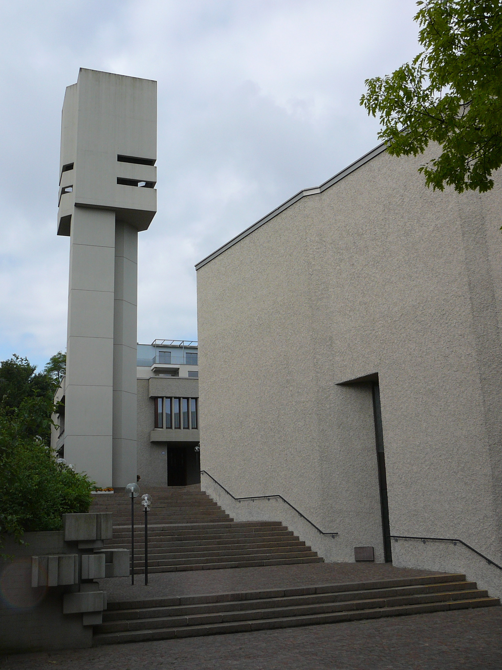 Römisch-katholische Kirche St. Katharina Zürich-Affoltern, Zugang von Wehntalerstrasse